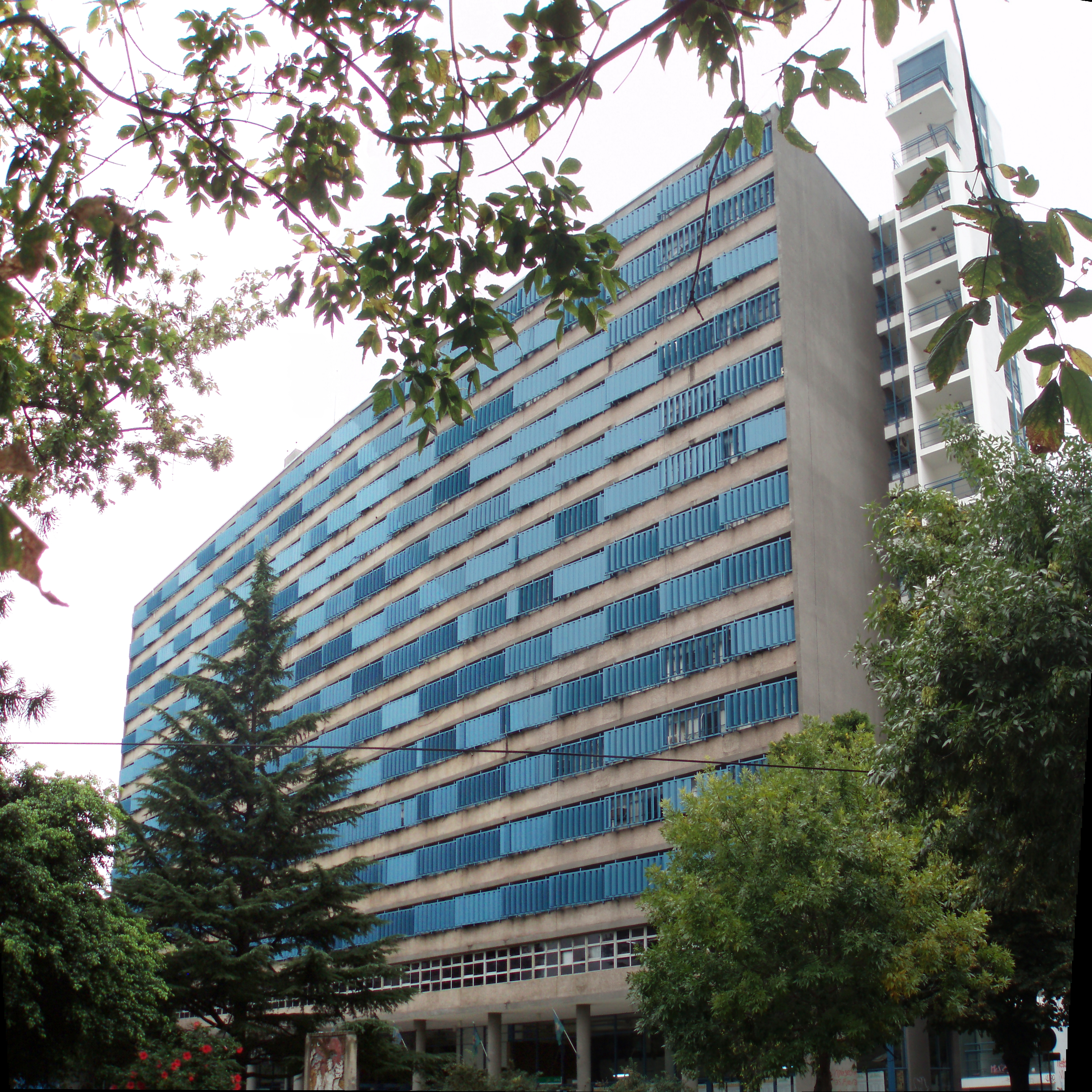 Ministerio de Infraestructura de la Provincia de Buenos Aires, en La Plata. Antiguo Ministerio de Obras Públicas.